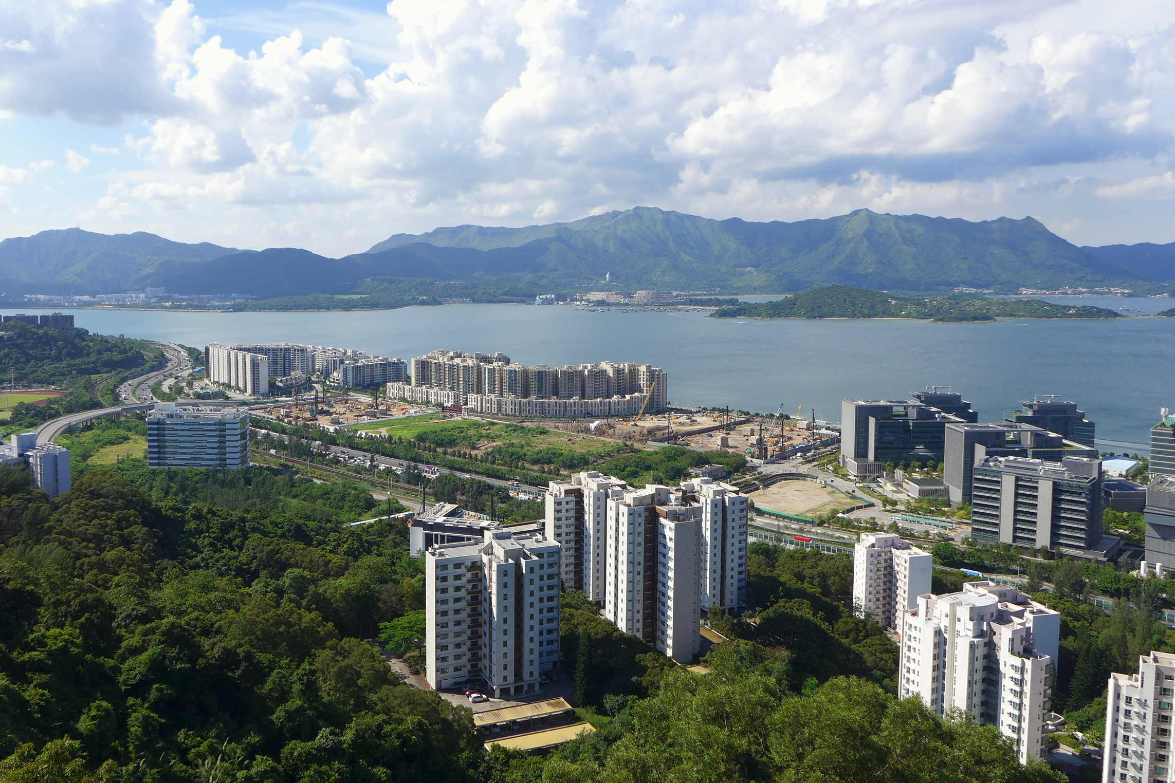 Pak Shek Kok